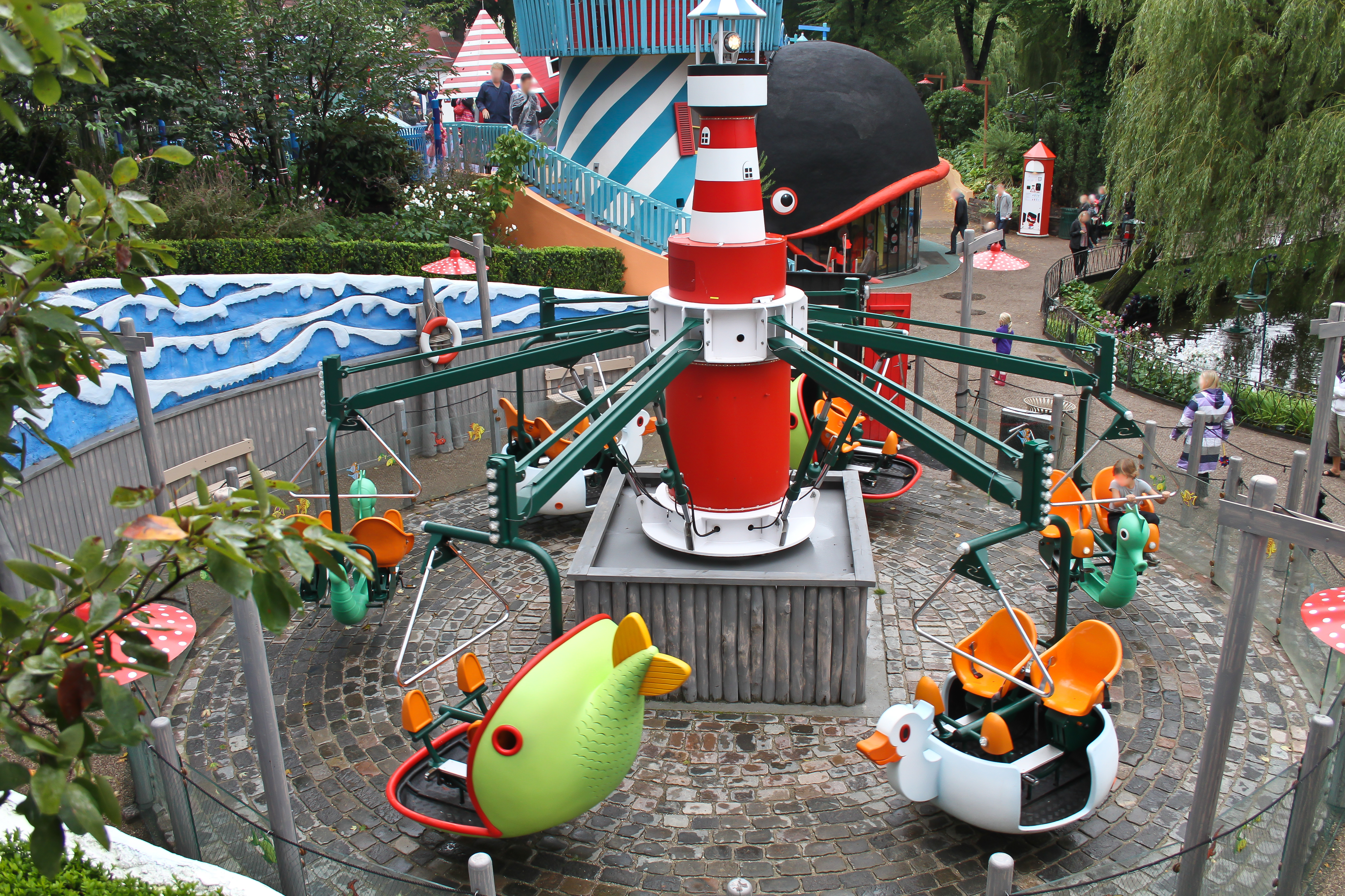 Kopenhagen,_Tivoli